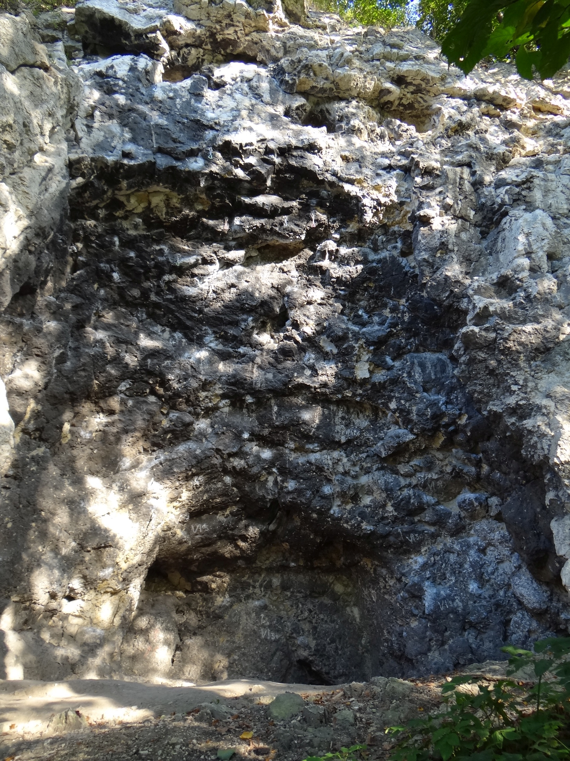 Skała Skurwysyn w Tyńcu nad Wisłą